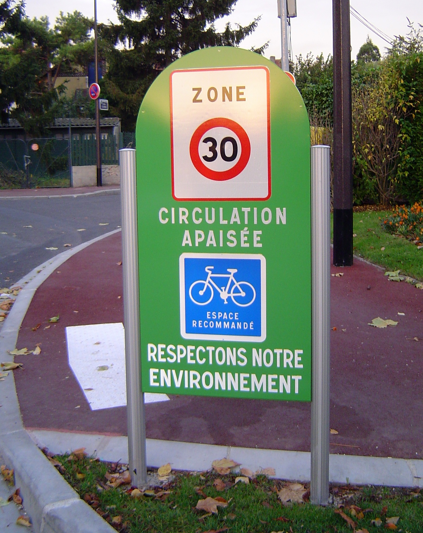 Photo d'un panneau zone30 à Antony